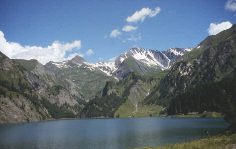 Lago Di Luzzone, Schweiz